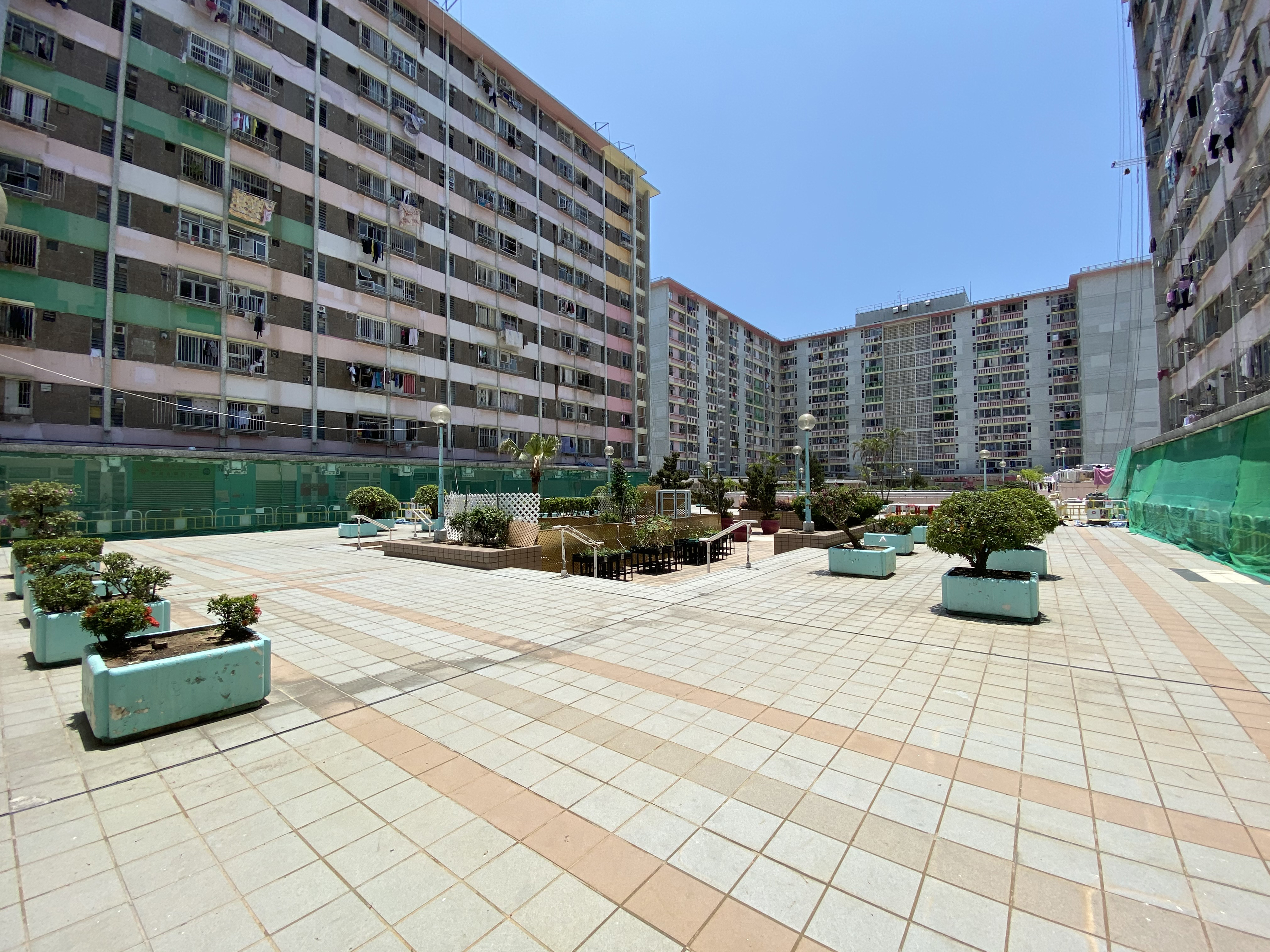 Lai Kok Estate Podium